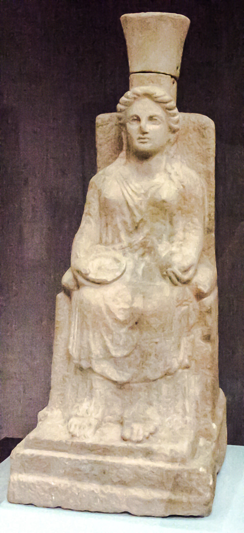 Statue en marbre de Héra couronnée, fin 5ème s. av. JC, avec la grenade dans la main comme symbole de la fertilité. Héraion de l'embouchure du Sélé à Paestum. L'iconographie rappelle celle de l'Héra de Polyclète à l'Héraion d'Argos.